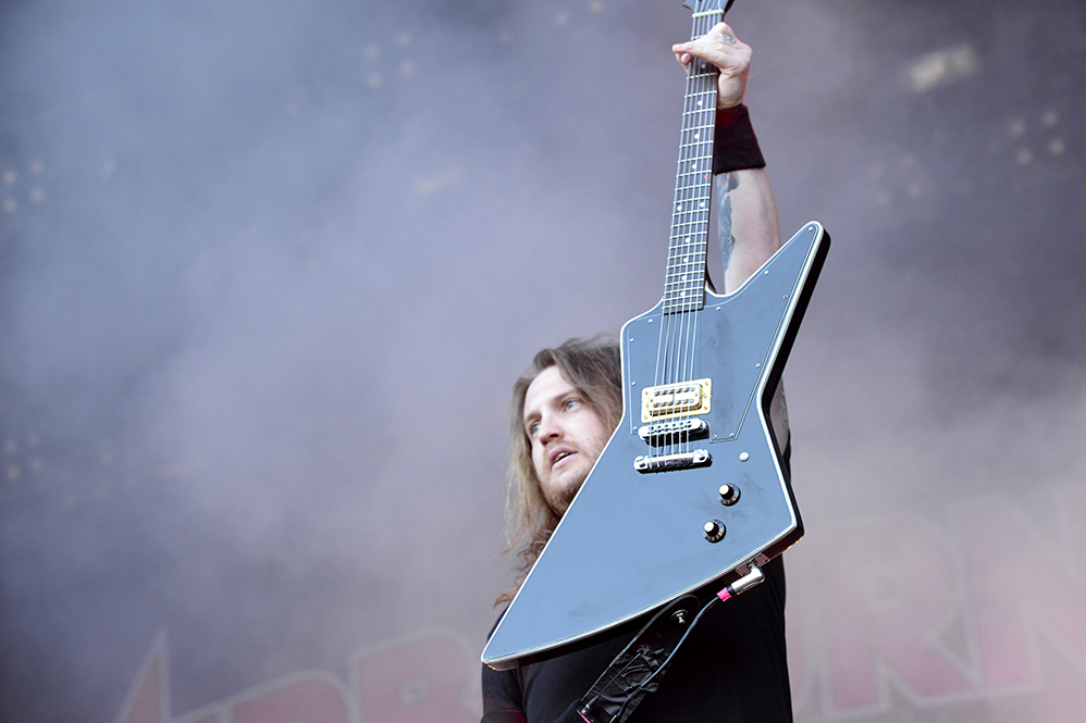 Matt "Harri" Harrison brille avec le groupe au festival de Beauregard le samedi 8 juillet 2017.